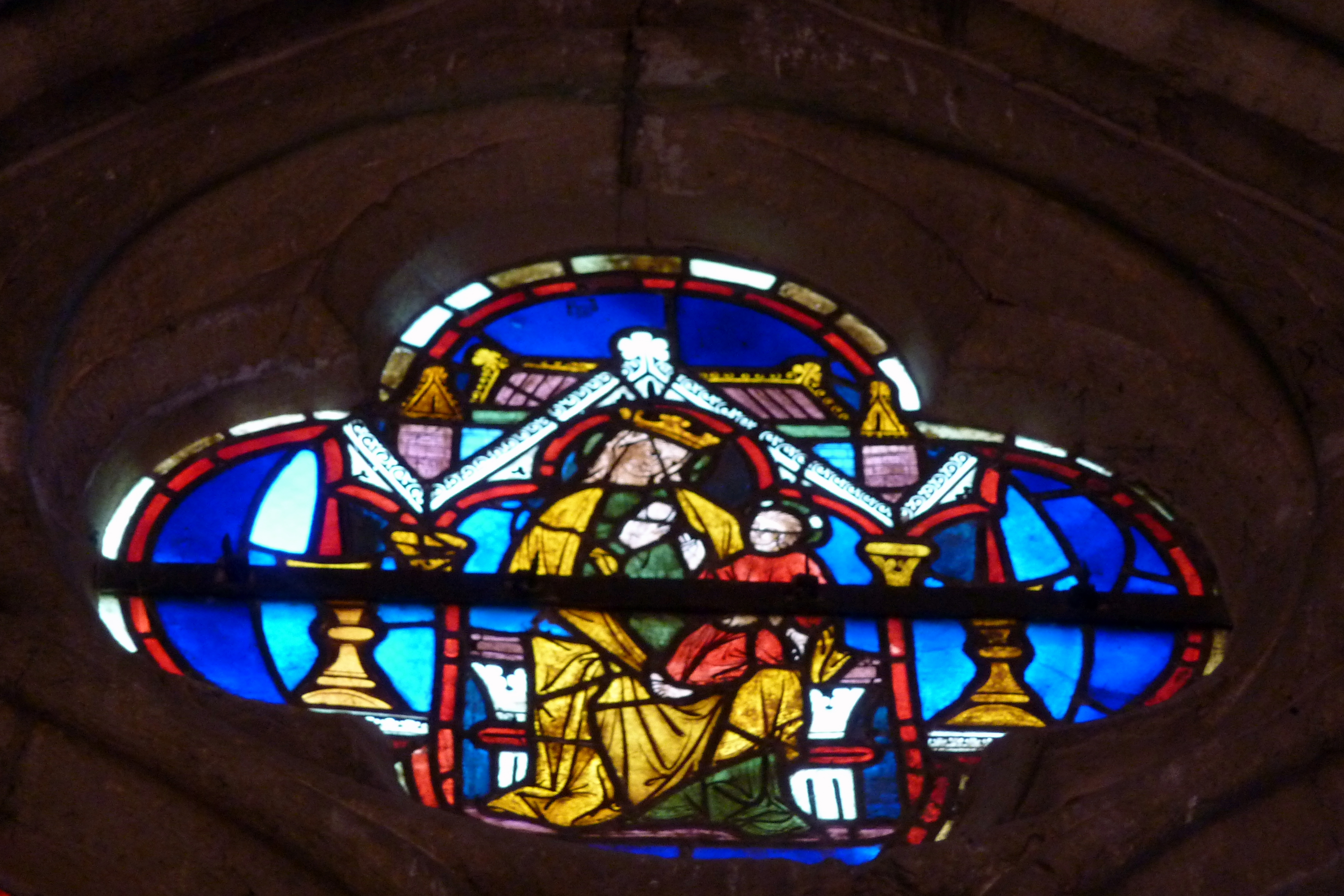 Kirche Sainte-Anne in Gassicourt, einem Stadtteil von Mantes-la-Jolie im Département Yvelines (Region Île-de-France/Frankreich), nördliches Chorfenster (baie 1) von 1260/70, Darstellung im Maßwerk: Maria mit Jesuskind